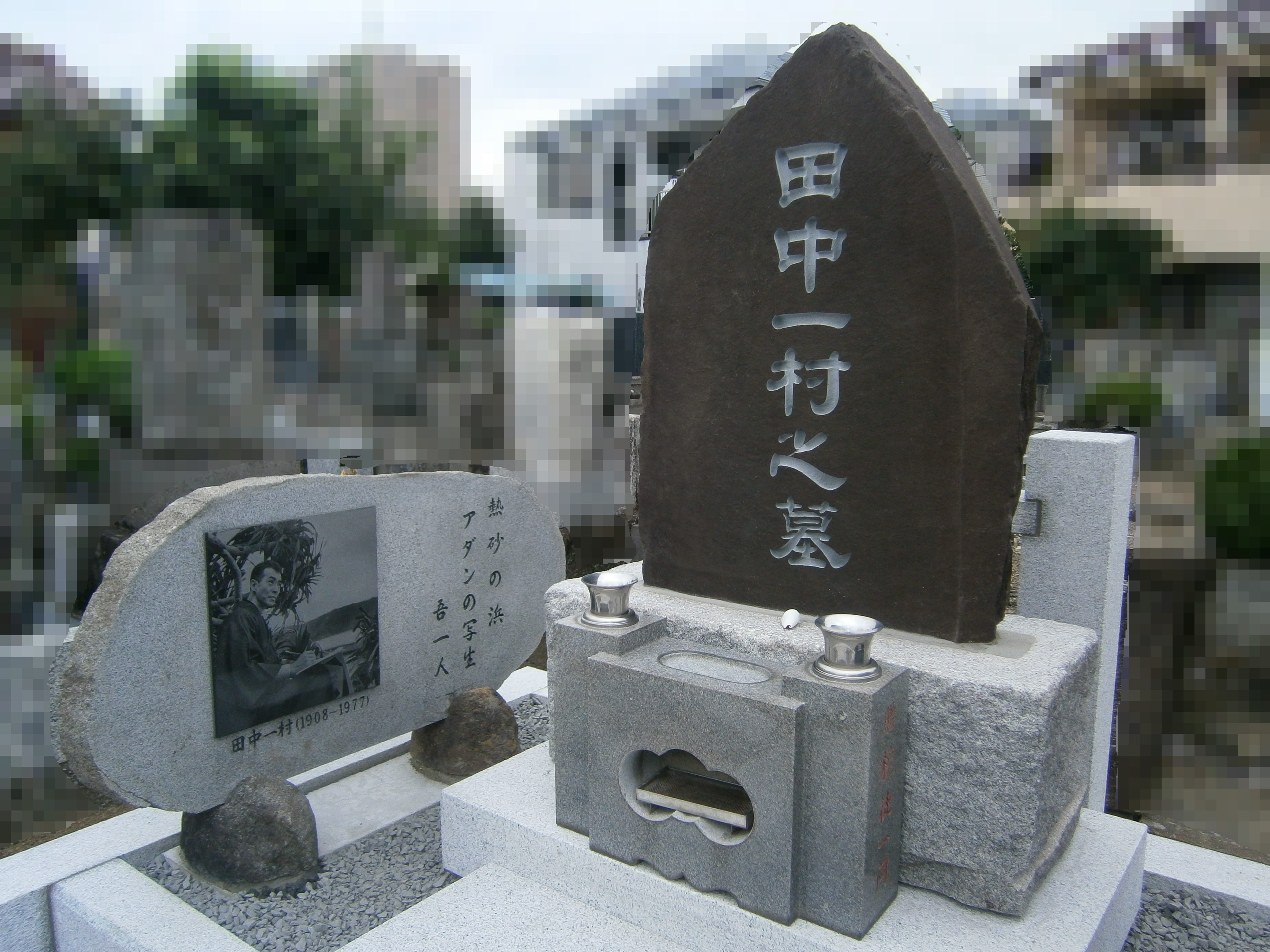 独自の画境を開拓した芸術家にふさわしく、趣のある自然石が建立されています(神奈川県産 根府川石使用)。